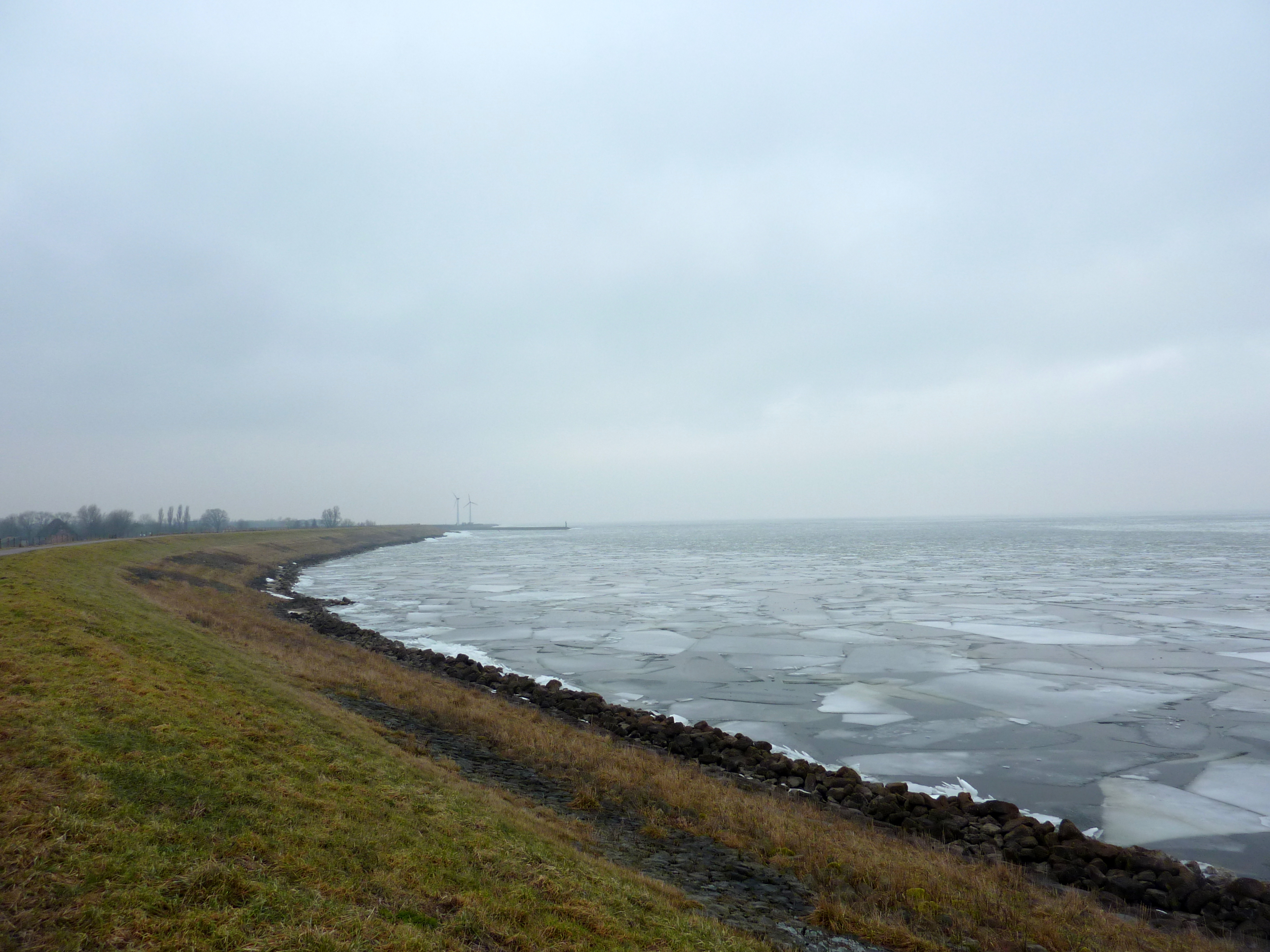 Enkhuizen - IJsselmeer - bevroren